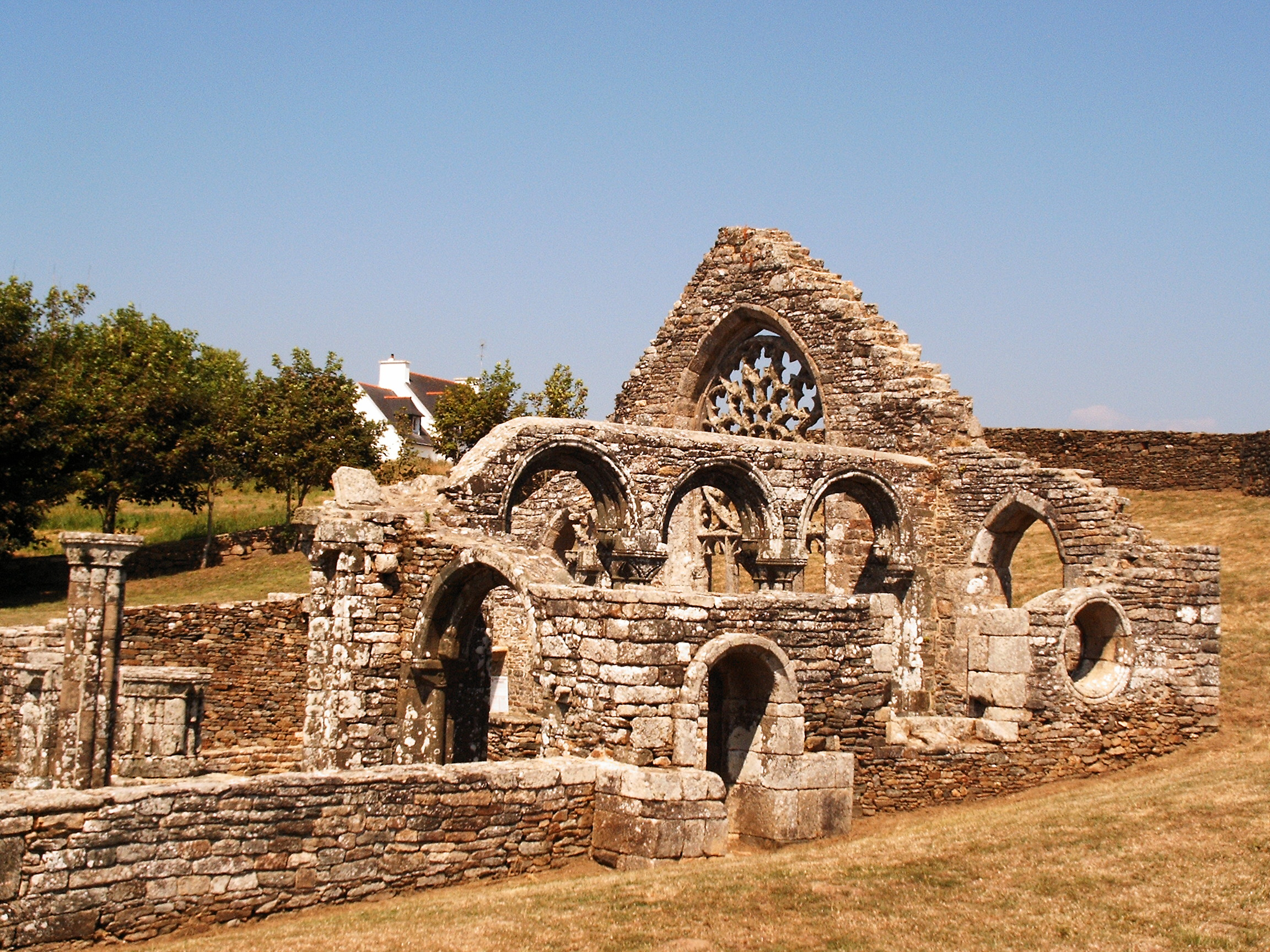 Ruine der Chapelle de Languidou , Gemeinde Plovan